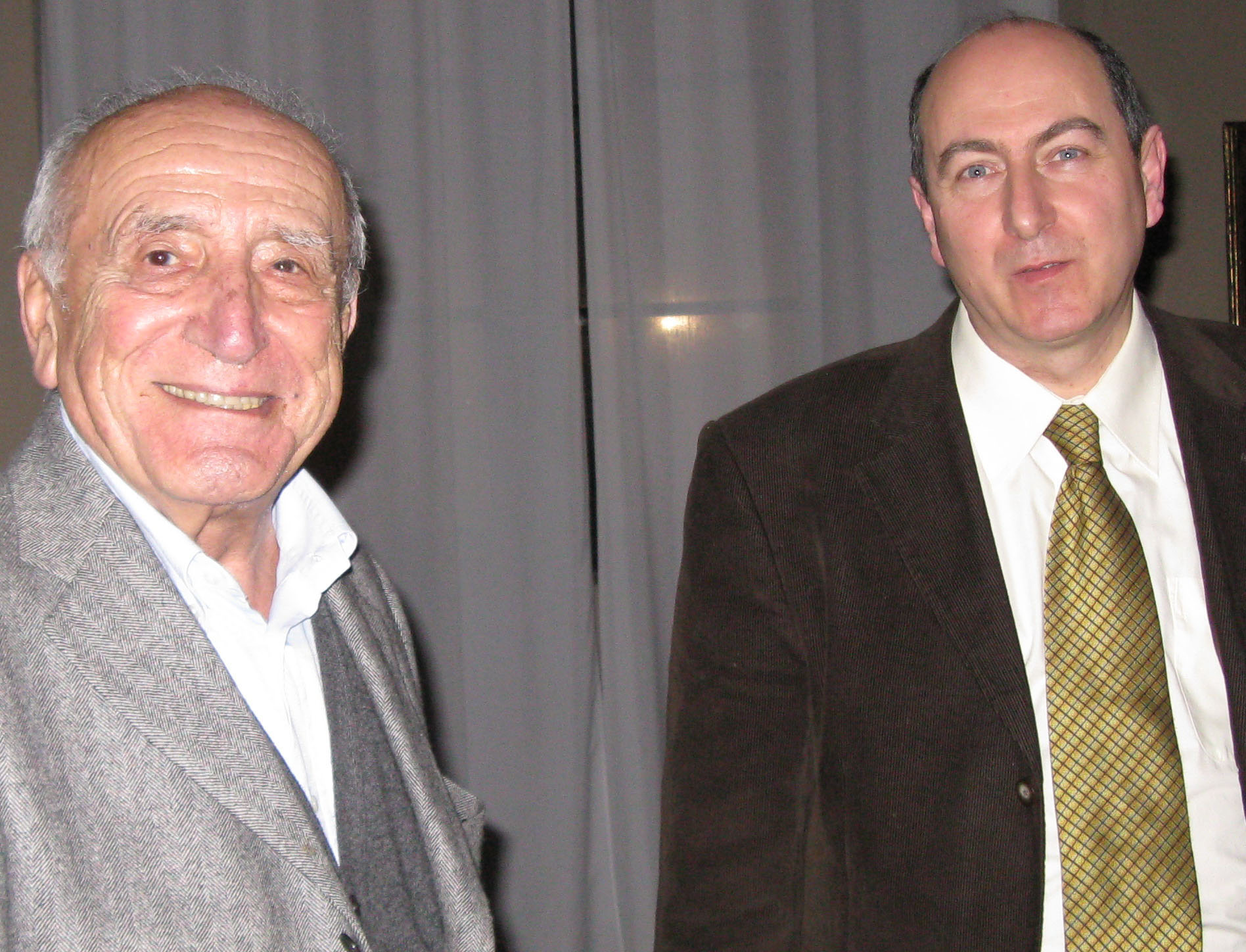 Roberto Becheri e Arnoldo Foà, Palazzo dei Diamanti, Ferrara, 9 marzo 2008